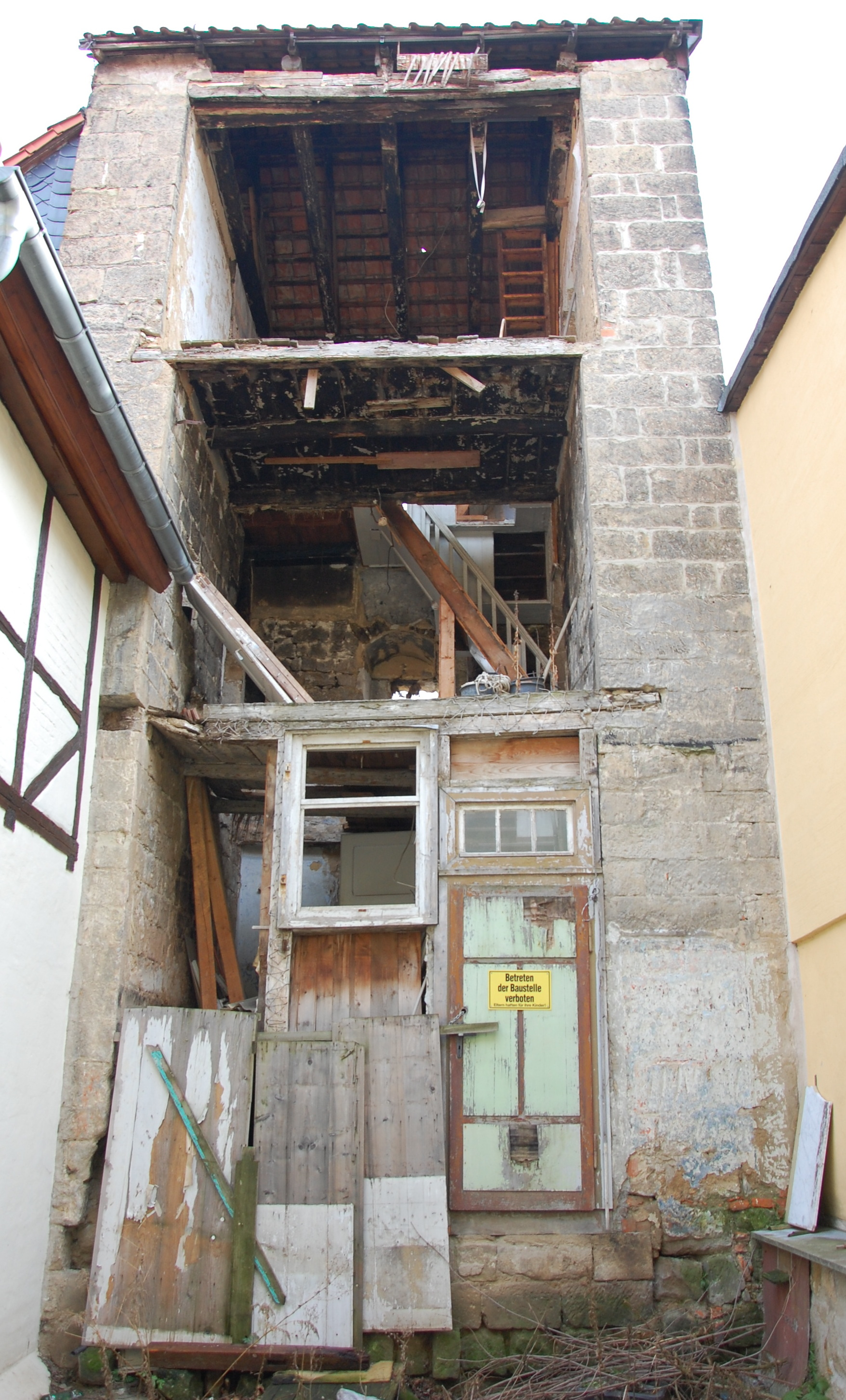 Schweinehirtenturm in Quedlinburg